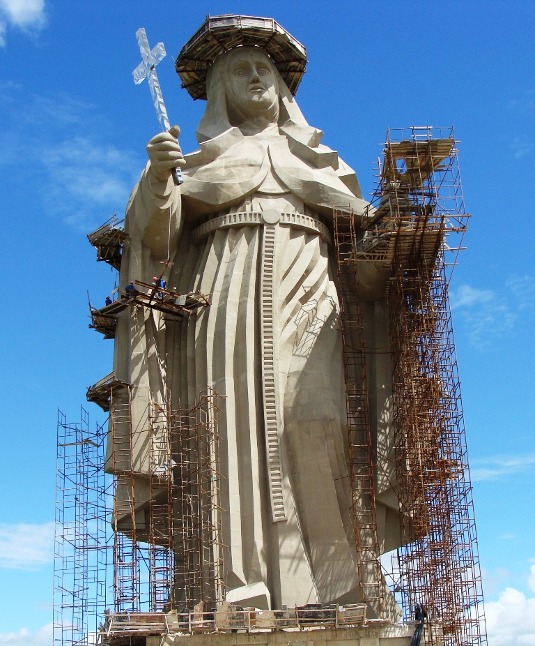 Estátua de Santa Rita de Cássia - em Santa Cruz/RN, em construção.